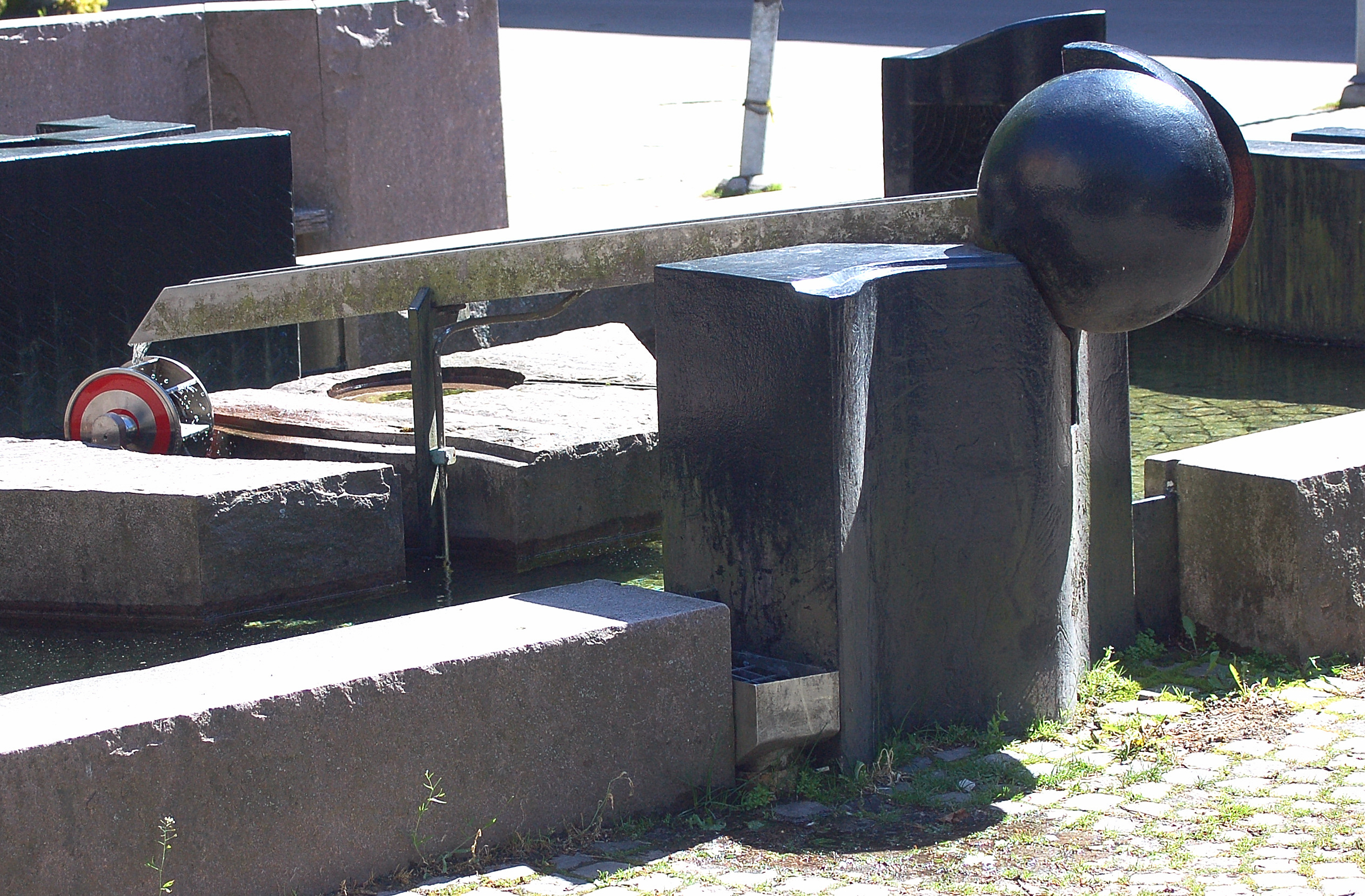 Torgdammen av Ove Lindblom, ålacerad utanför Stadsbiblioteket i Karlstad.